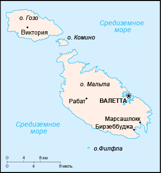 Перевод на русский язык карты из "The World Factbook"